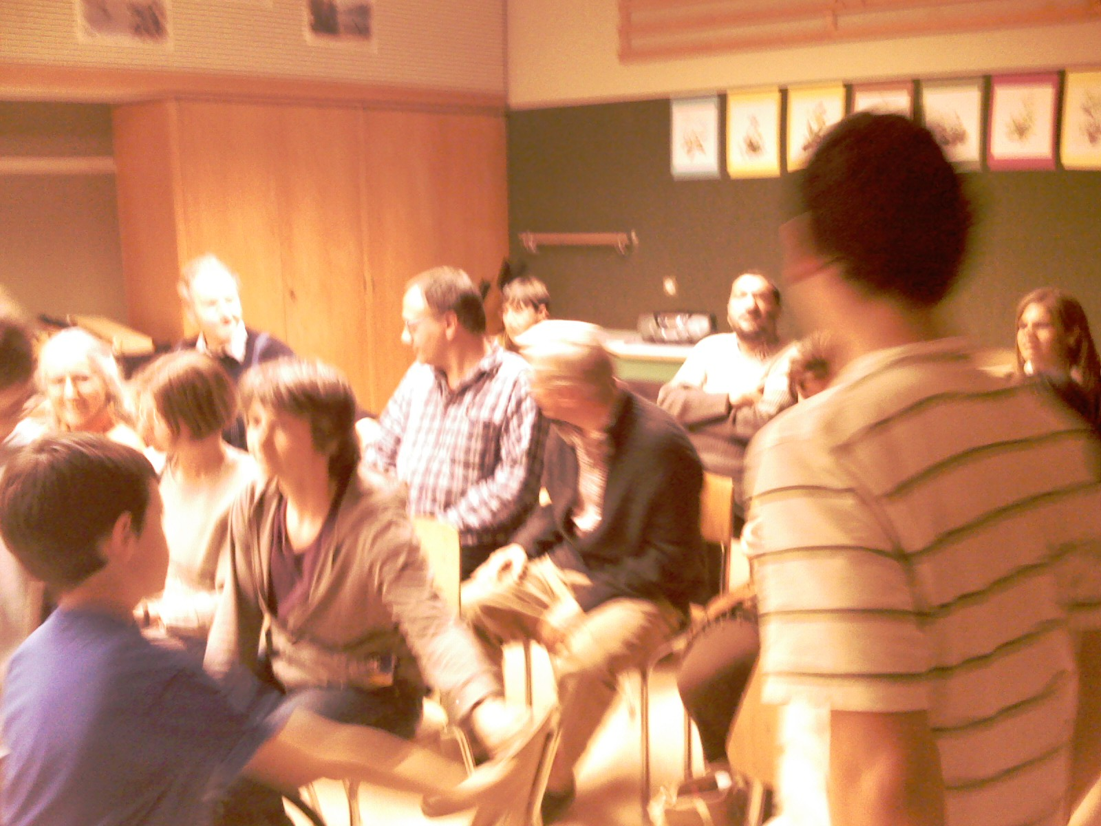 Partoprenantoj la Familia Esperanto-renkontiĝo en Sangernboden, Komunumo de Guggisberg, Kantono Berno, Svislando